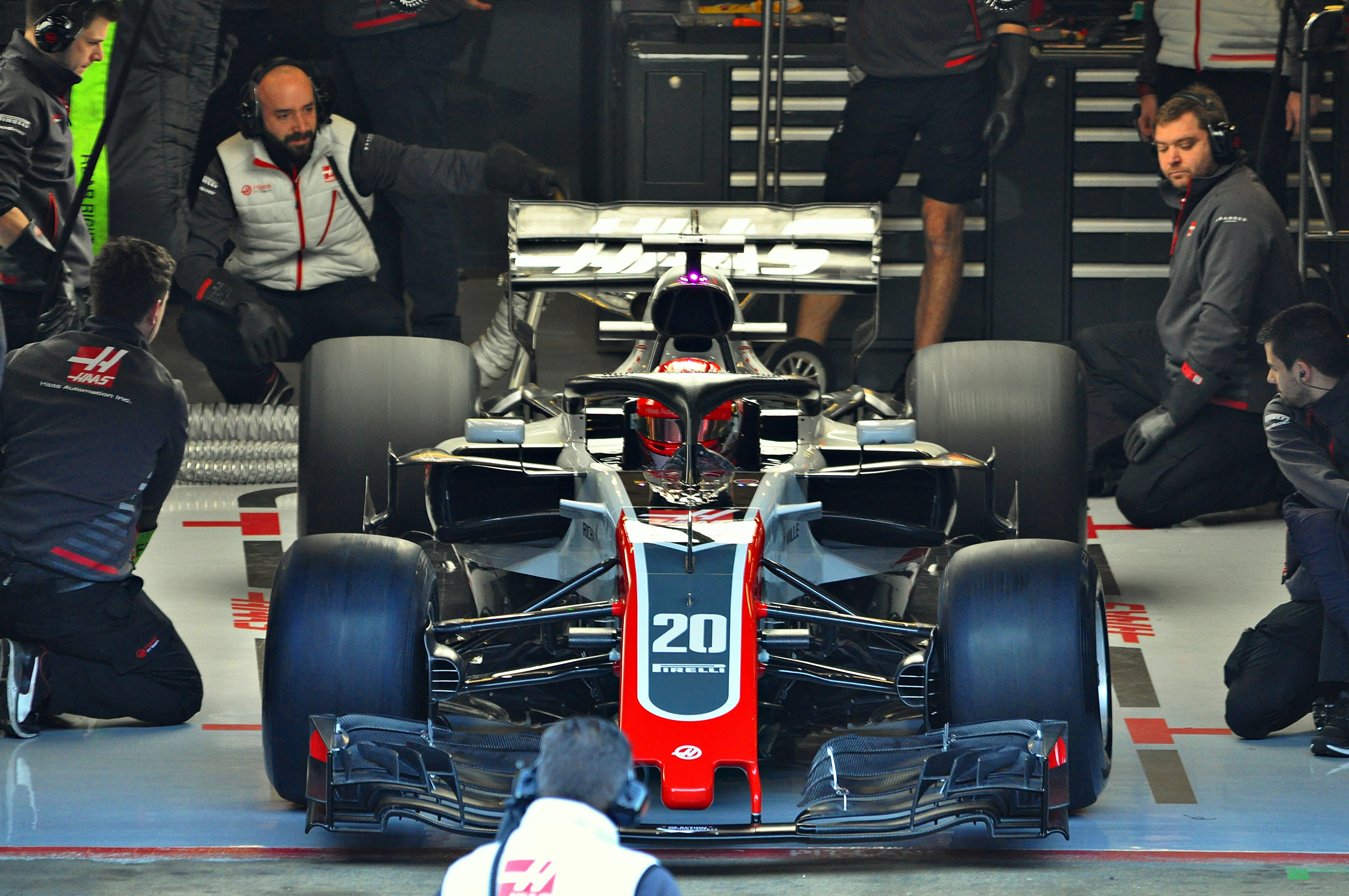 Hass VF-18